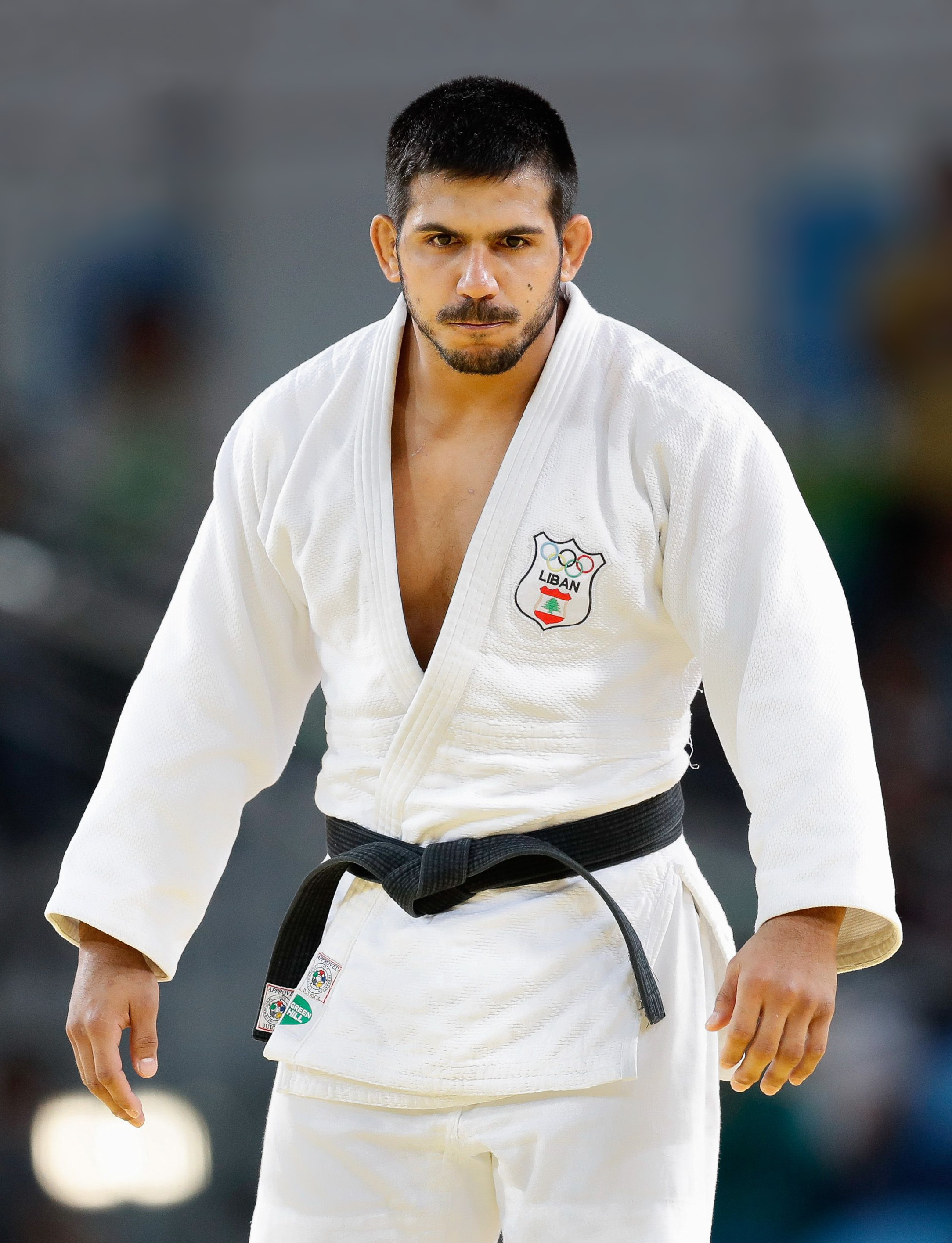 Judô na Arena Carioca dos Jogos Olímpicos Rio 2016 Rio de Janeiro - Judoca brasileiro naturalizado libanГЄs Nacif Elias reclama da arbitragem apГіs ser desclassificado e retorna ao tatame para pedir desculpas apГіs deixar a ГЎrea de competiГ§ГЈo na Arena Carioca dos Jogos OlГ­mpicos Rio 2016. (Fernando FrazГЈo/AgГЄncia Brasil)